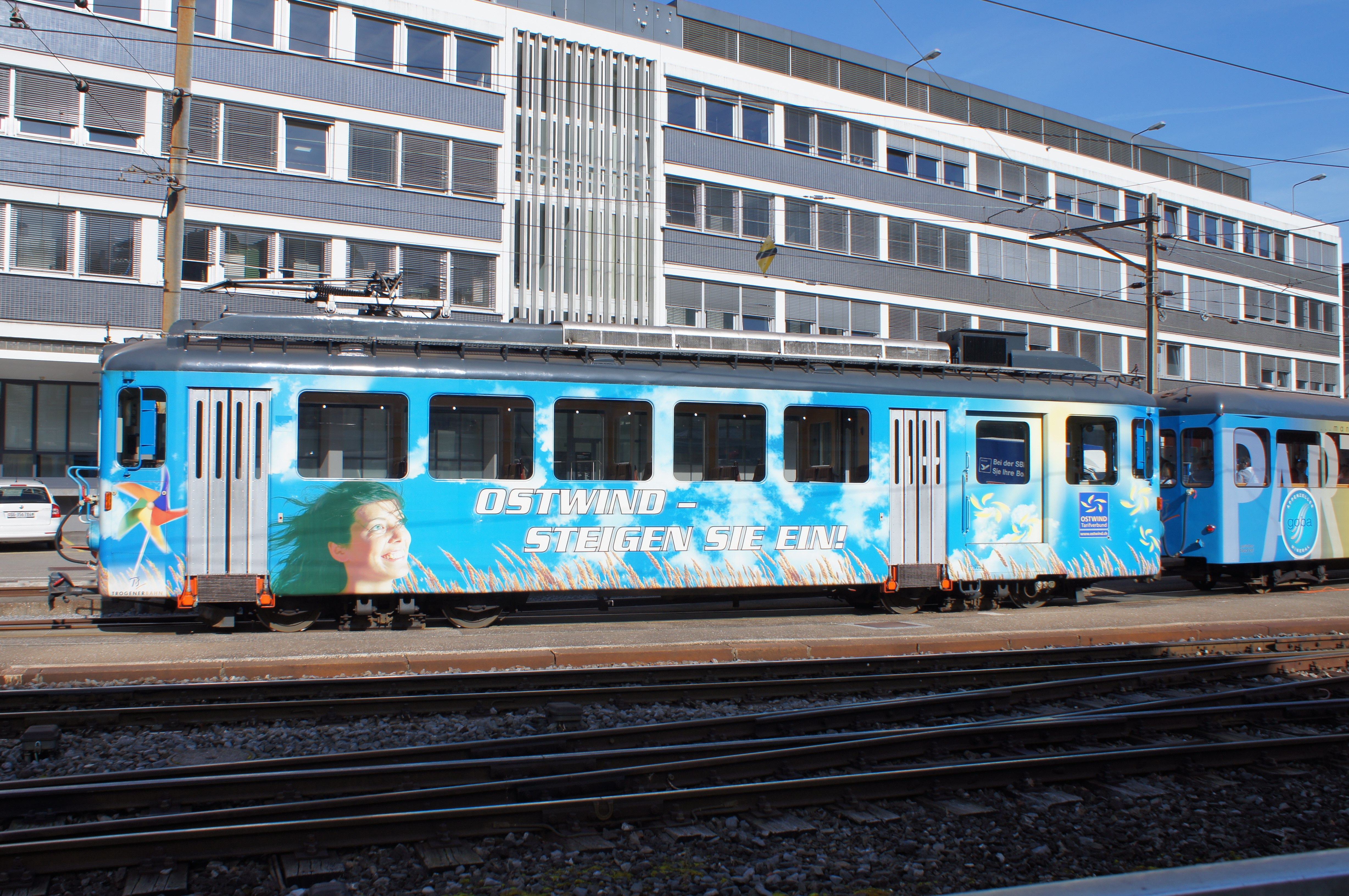 Triebwagen BDe 4/4 7 der früheren Trogenerbahn, jetzt Appenzeller Bahnen